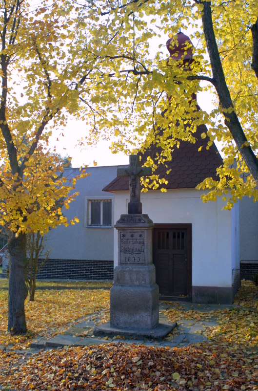 Kaple a kamenný pamětní kříž z roku 1879 v Holovousích.